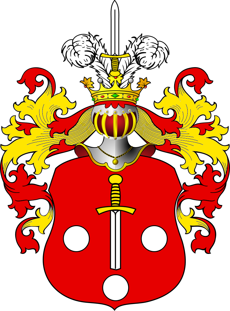 Герб Лімонт ІІ